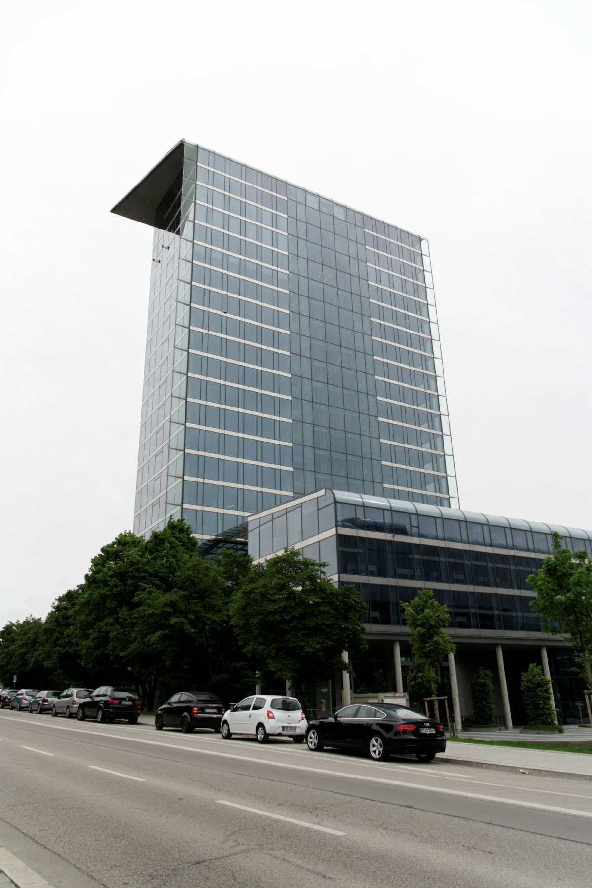 München, Skyline Tower an der Domagkstraße